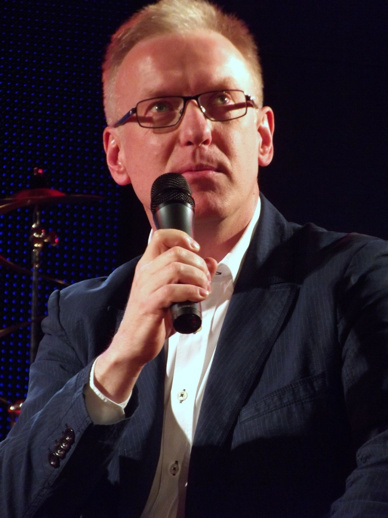 Zdjęcie zrobione podczas gali rozdania dziennikarskich nagród dziennikarskich MediaTory 2013 w Krakowie.